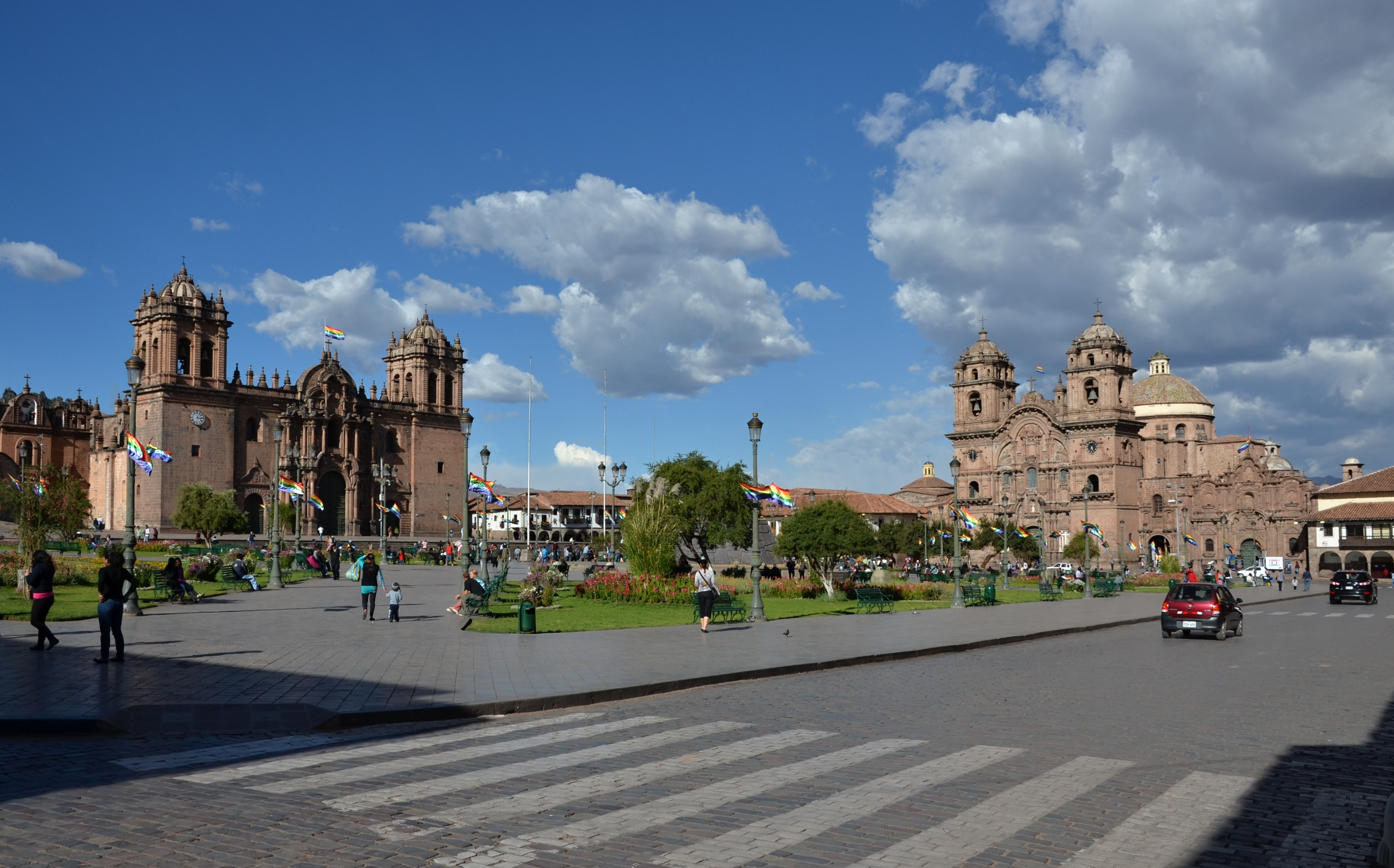 Cusco - Plaza de Armas